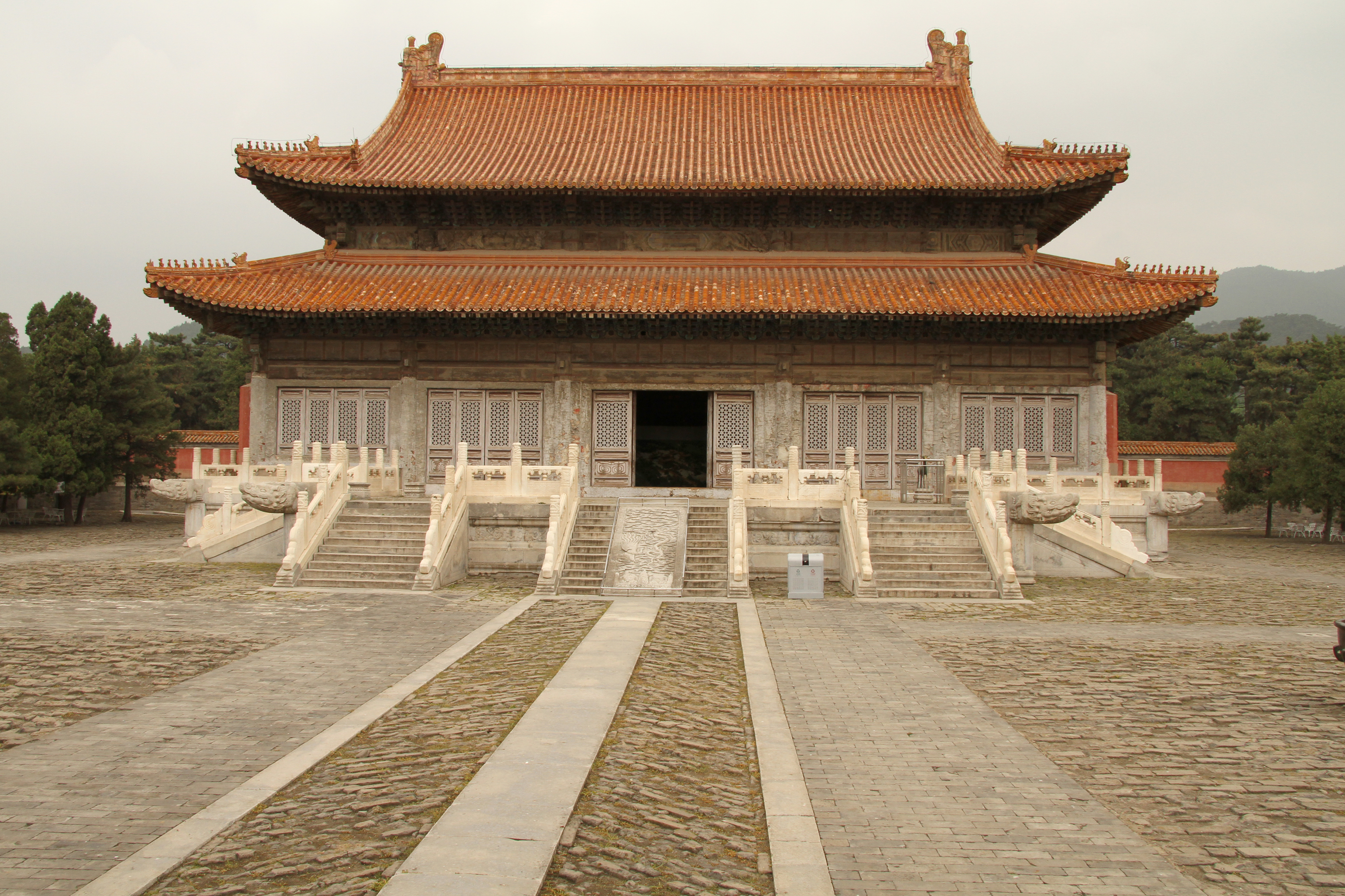 Qing Tombs 10